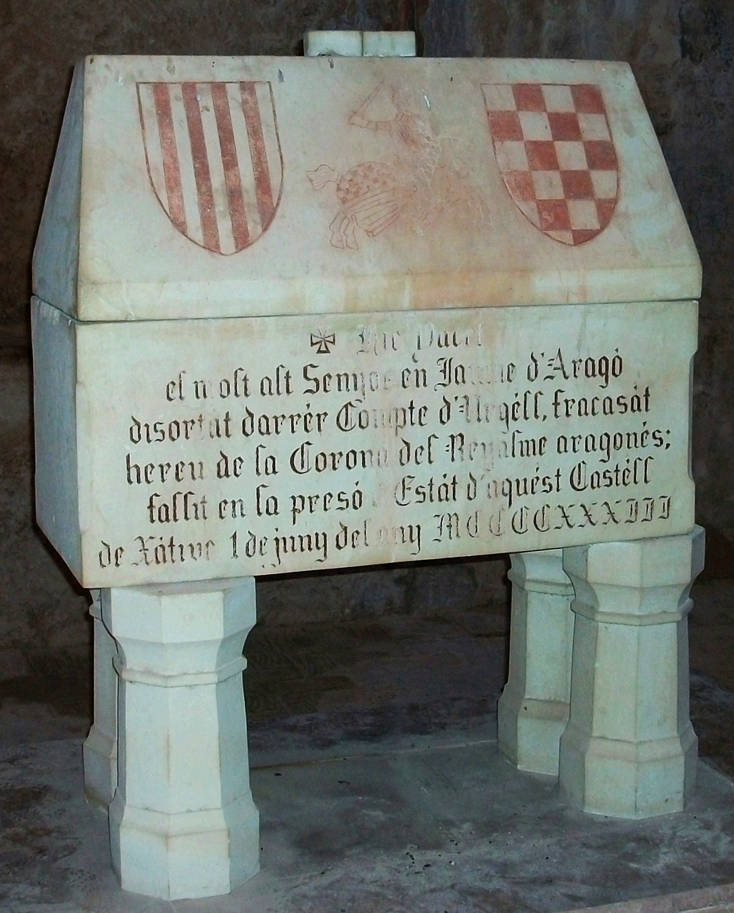 Sarcòfag modern que, suposadament, conté les despulles del comte Urgell, Jaume II d'Urgell, pretendent a la Corona d'Aragó en el Compromís de Casp, pres en el castell de Xàtiva, on va morir. Es troba a la capella de santa Maria del mateix castell.